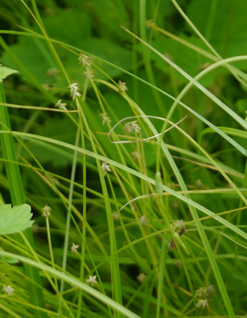 Carex uda：エゾハリスゲ 2018/06/24 北海道・釧路／Kushiro, Hokkaido, Japan